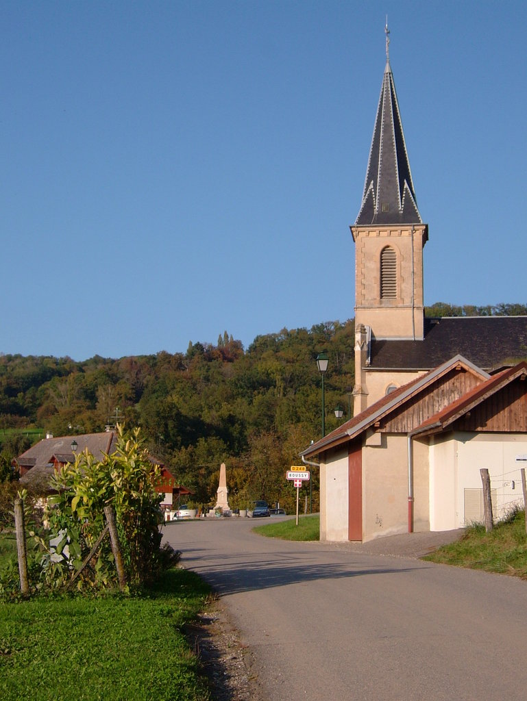 Chef-lieu de Boussy (74150).